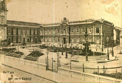 Foto antiga da Faculdade de Medicina da Universidade Federal da Bahia (UFBA)